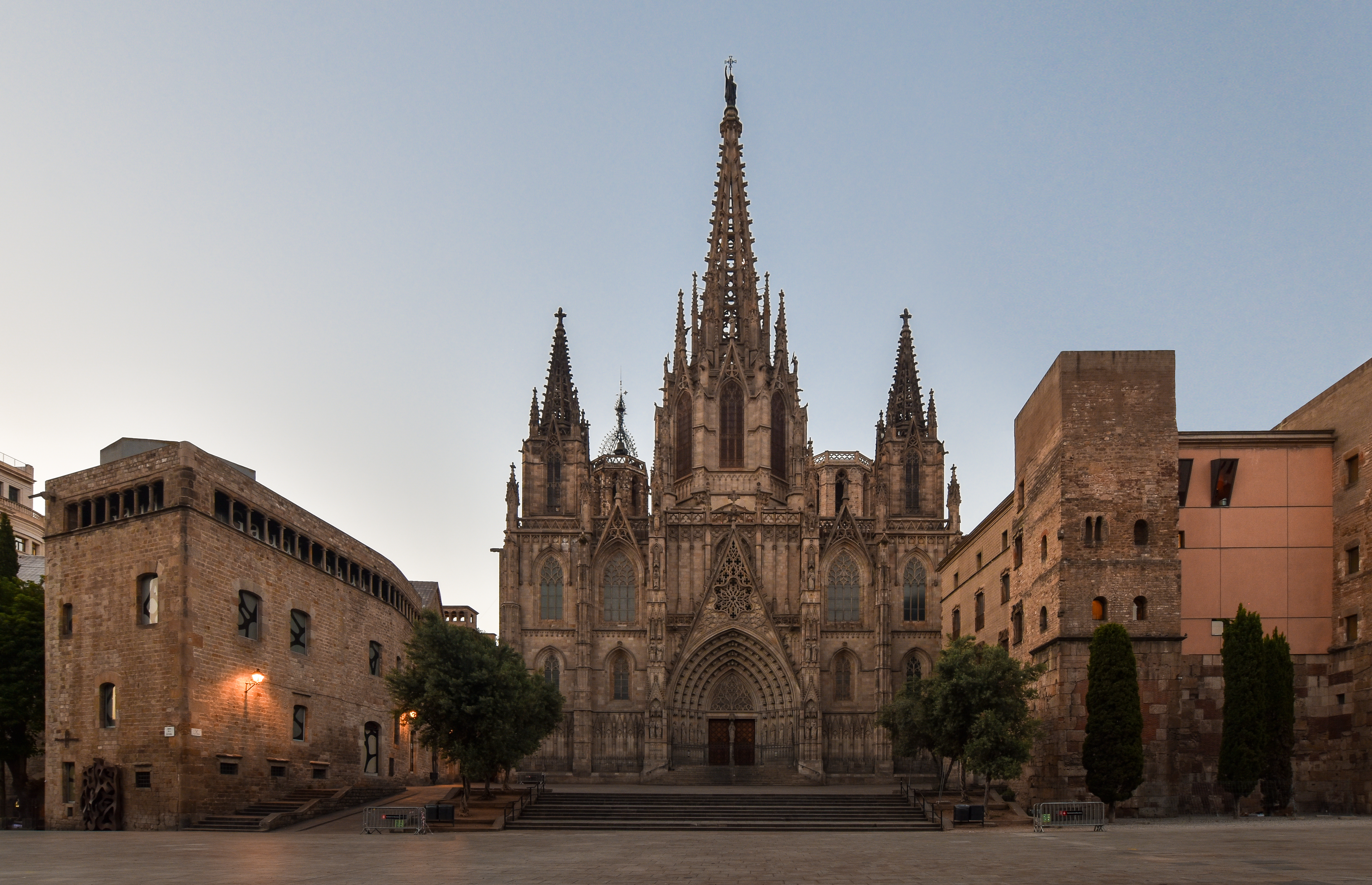 Fachada principal de la Catedral de Barcelona al amanecer